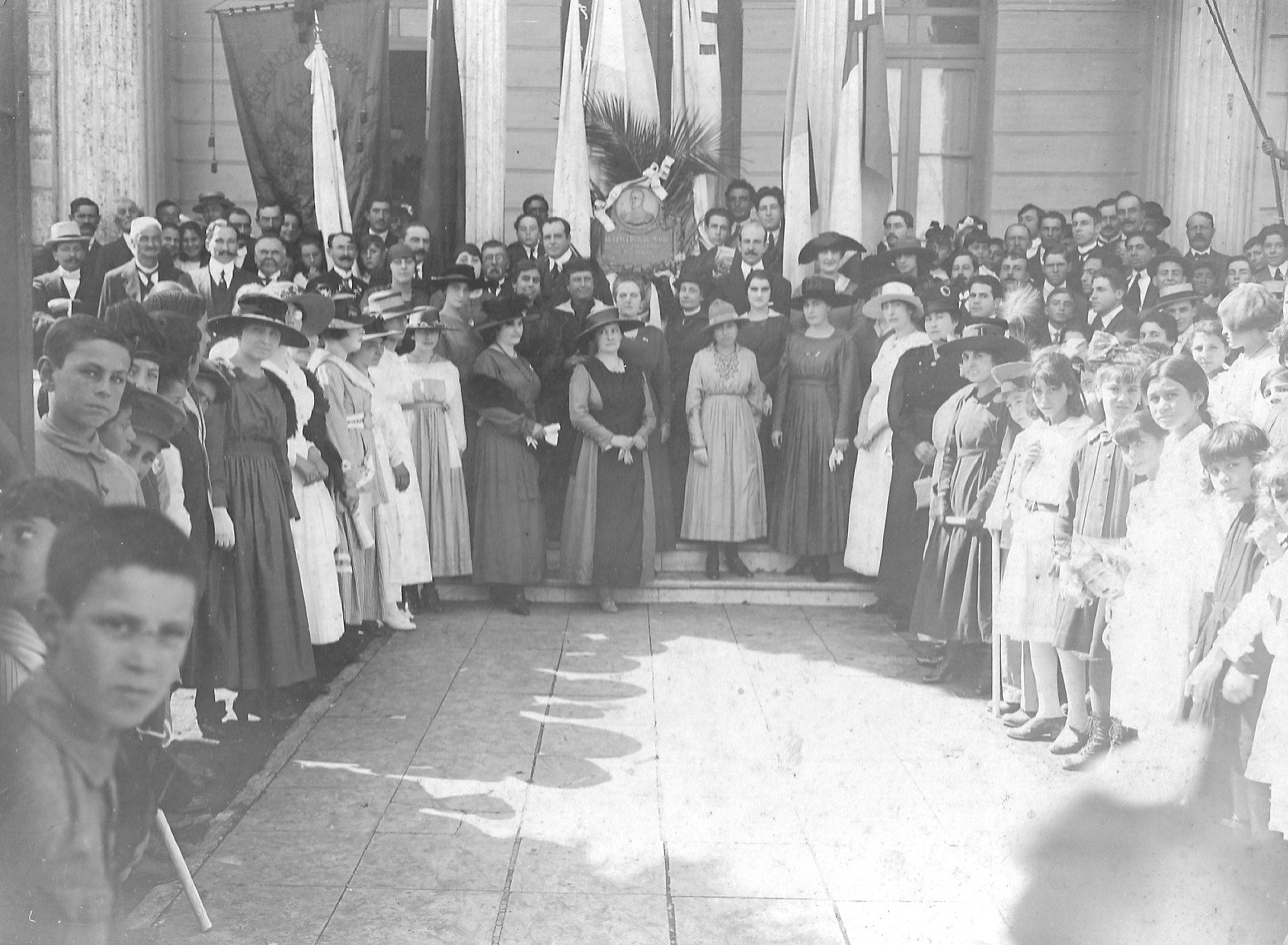 Miembros de la comunidad española de Merlo reunidos en el palacio municipal.